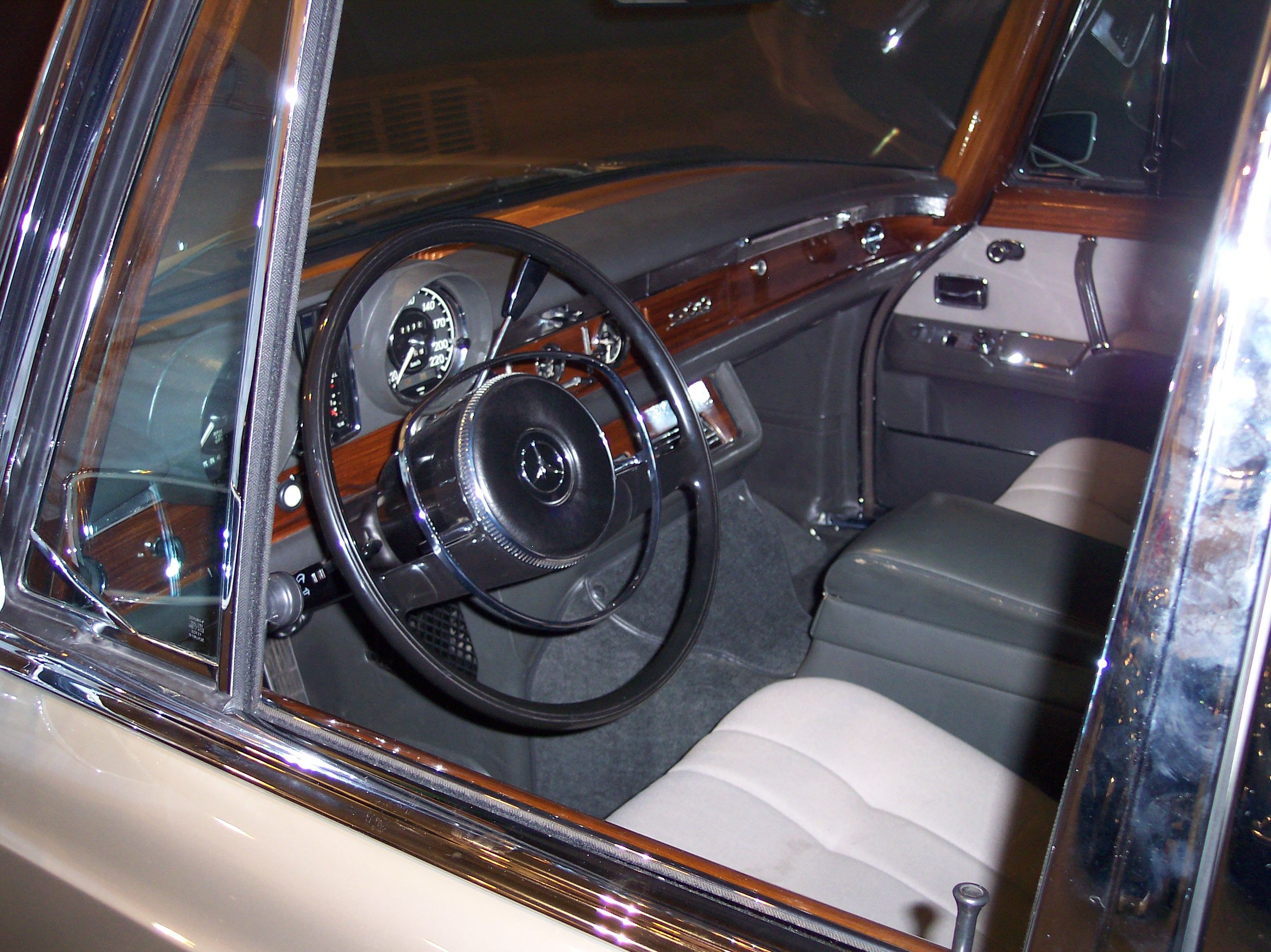 Mercedes-Benz 600 cockpit